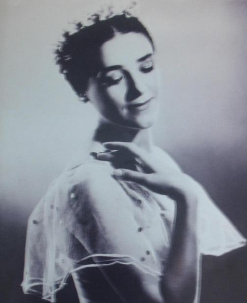 Ирина Трофимовна Худова, финская балерина